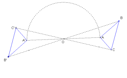 Symétrie centrale plane